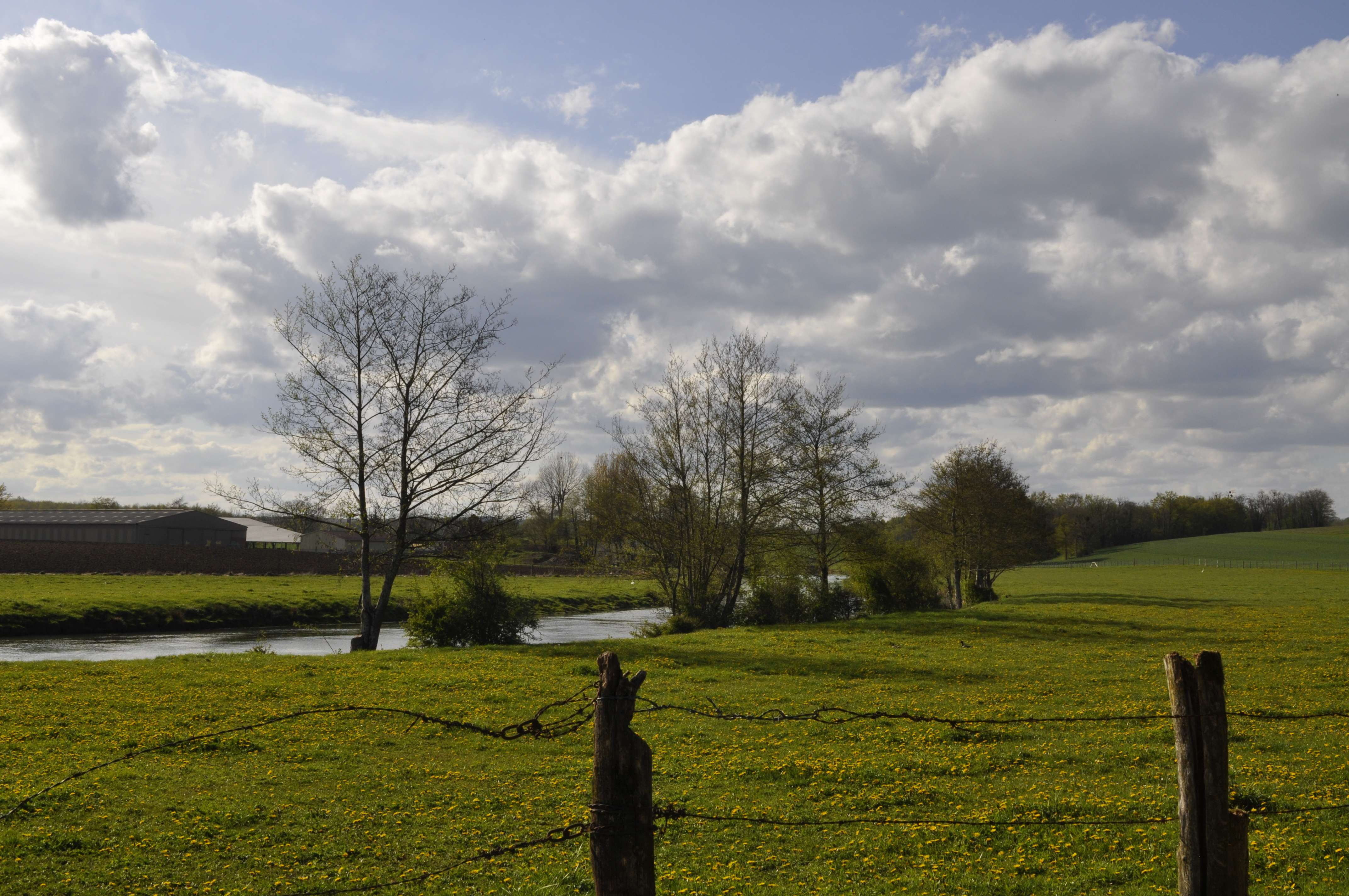 La Bèze en plein champs à Noiron-sur-Bèze (Côte d'Or).